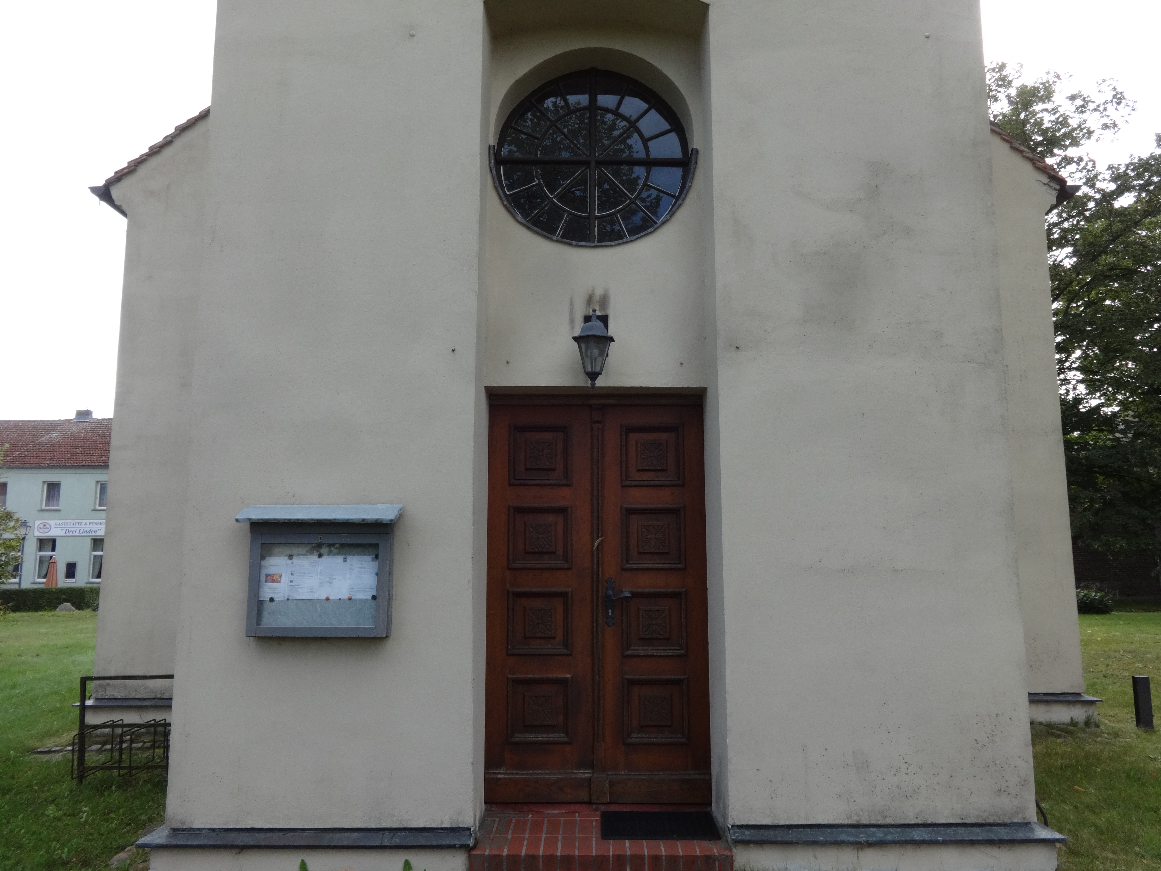 Die Dorfkirche in Seddin, Gemeinde Seddiner See im Landkreis Potsdam-Mittelmark, ist eine Saalkirche aus dem Jahr 1735. Im Innern stehen unter anderem ein polygonaler Kanzelaltar sowie eine Hufeisenempore.